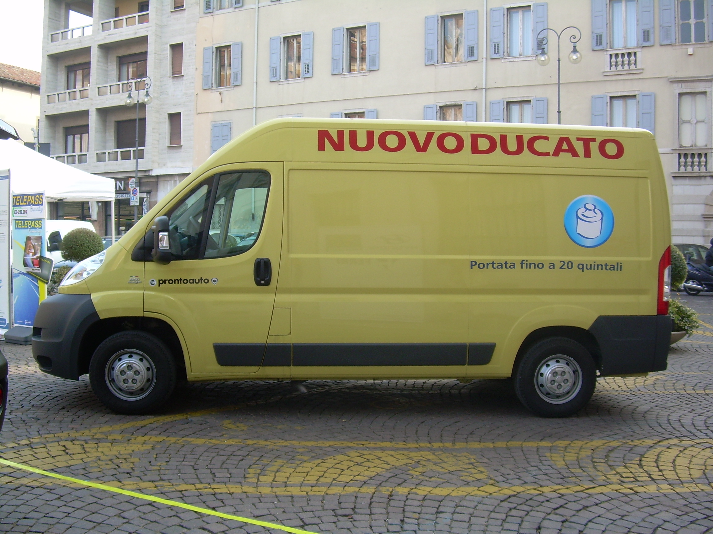 Fiat Ducato 3